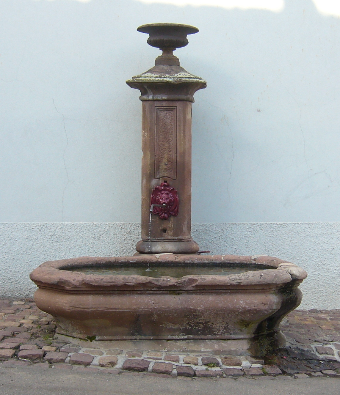 Fontaine ovale dans la rue Fulrade, à Saint-Hippolyte, dans le Haut-Rhin